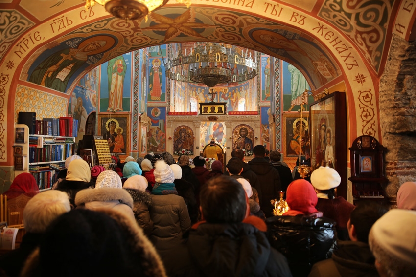 Інтэр'ер Дабравешчанскай царквы. Віцебск.